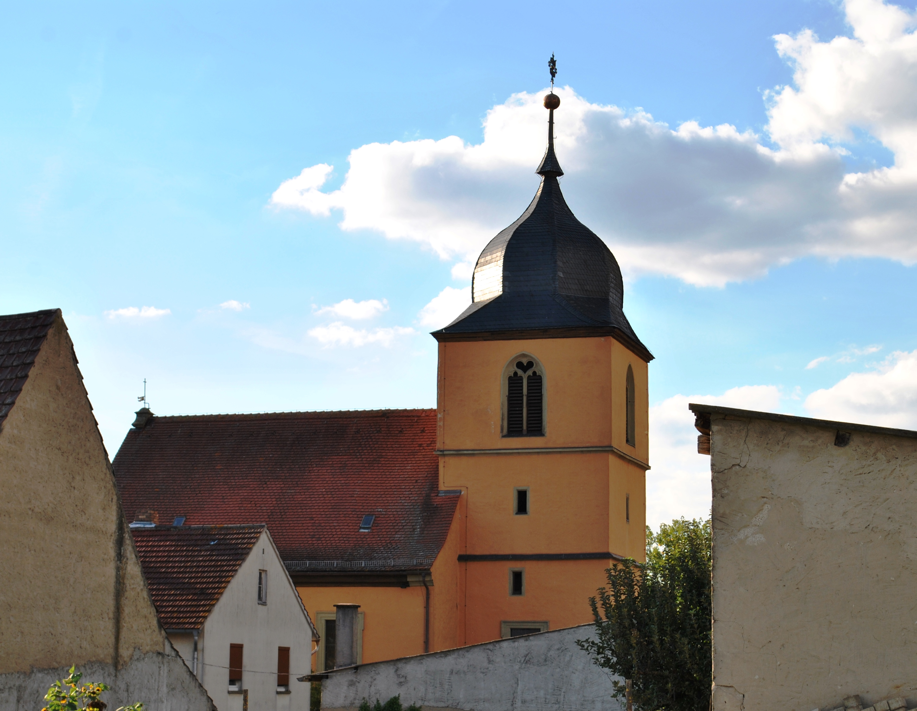 Katholische Pfarrkirche St. Sebastian Chorturmkirche, Turmuntergeschosse spätgotisch, Obergeschoss von 1610, Langhaus 1723–1724; mit AusstattungThis is a photograph of an architectural monument.